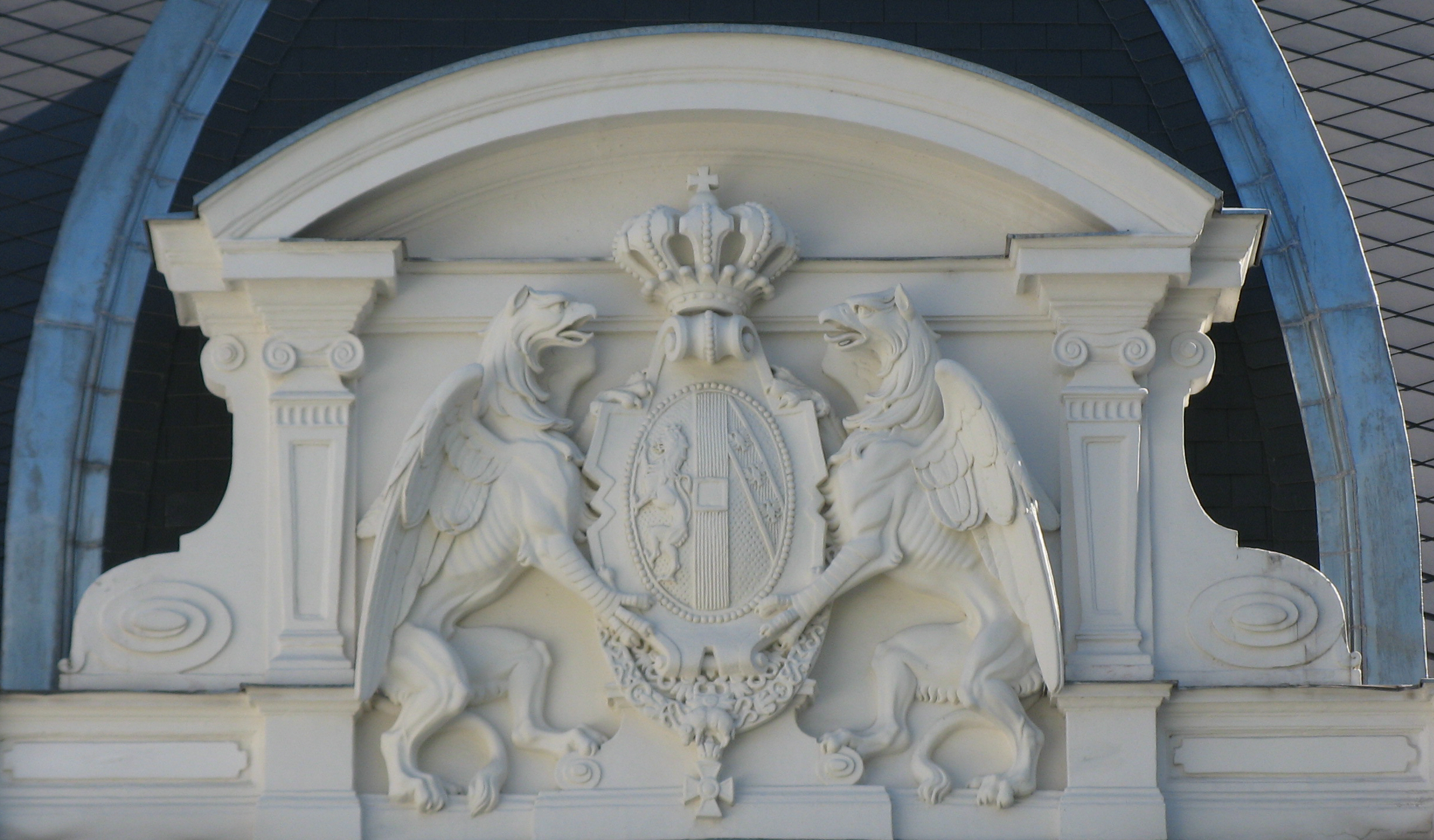 Wappen Habsburg-Lothringen am Palais Erzherzog Carl Ludwig, Favoritenstraße 7, Wien-Wieden